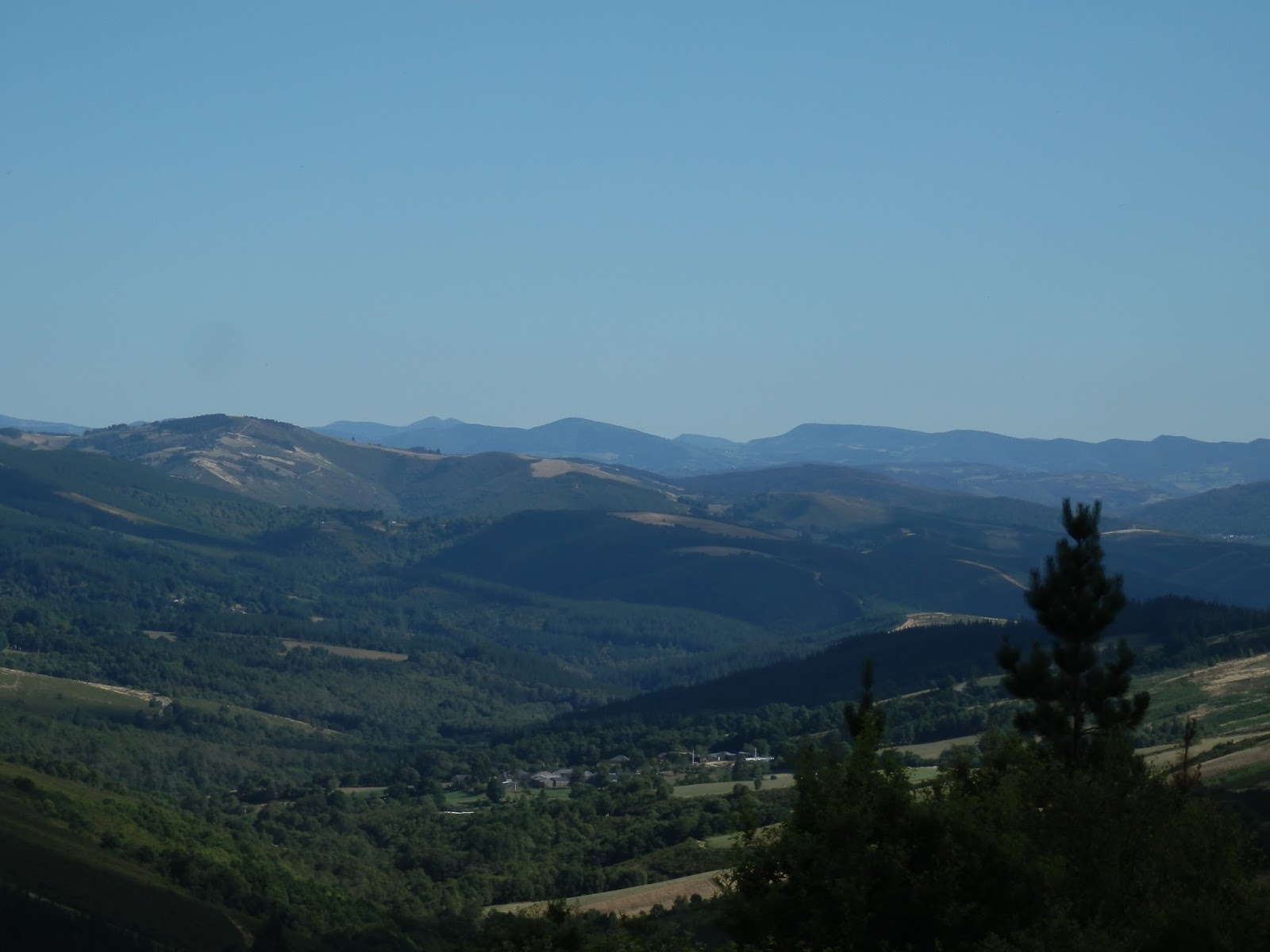 O Sesto, Baleira, España